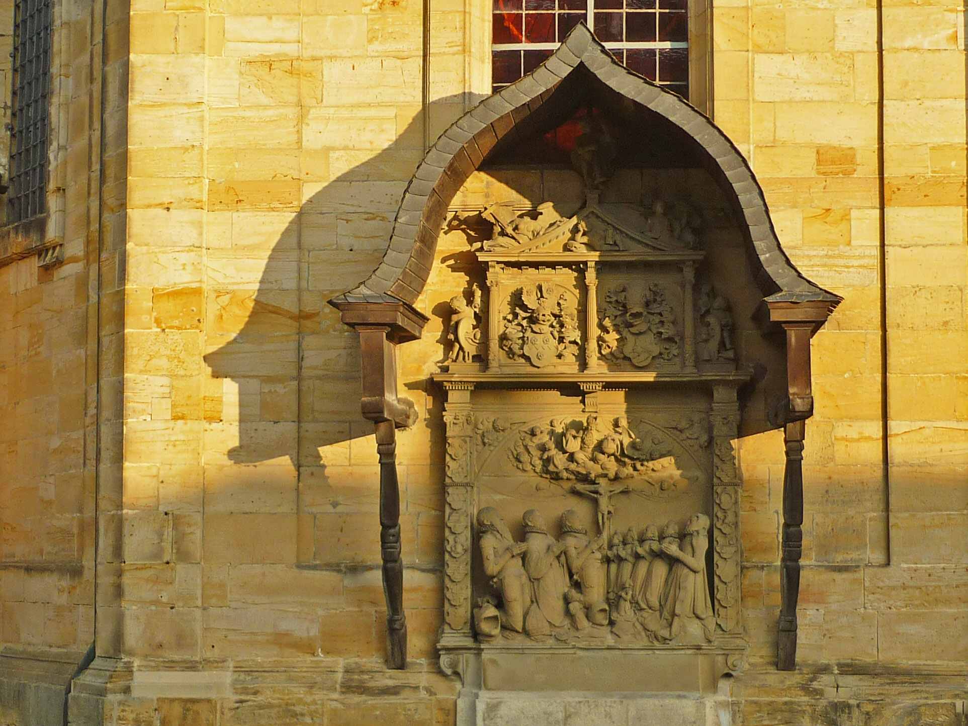 Mengersdorf-Epitaph an der Außenseite der Basilika in Gößweinstein